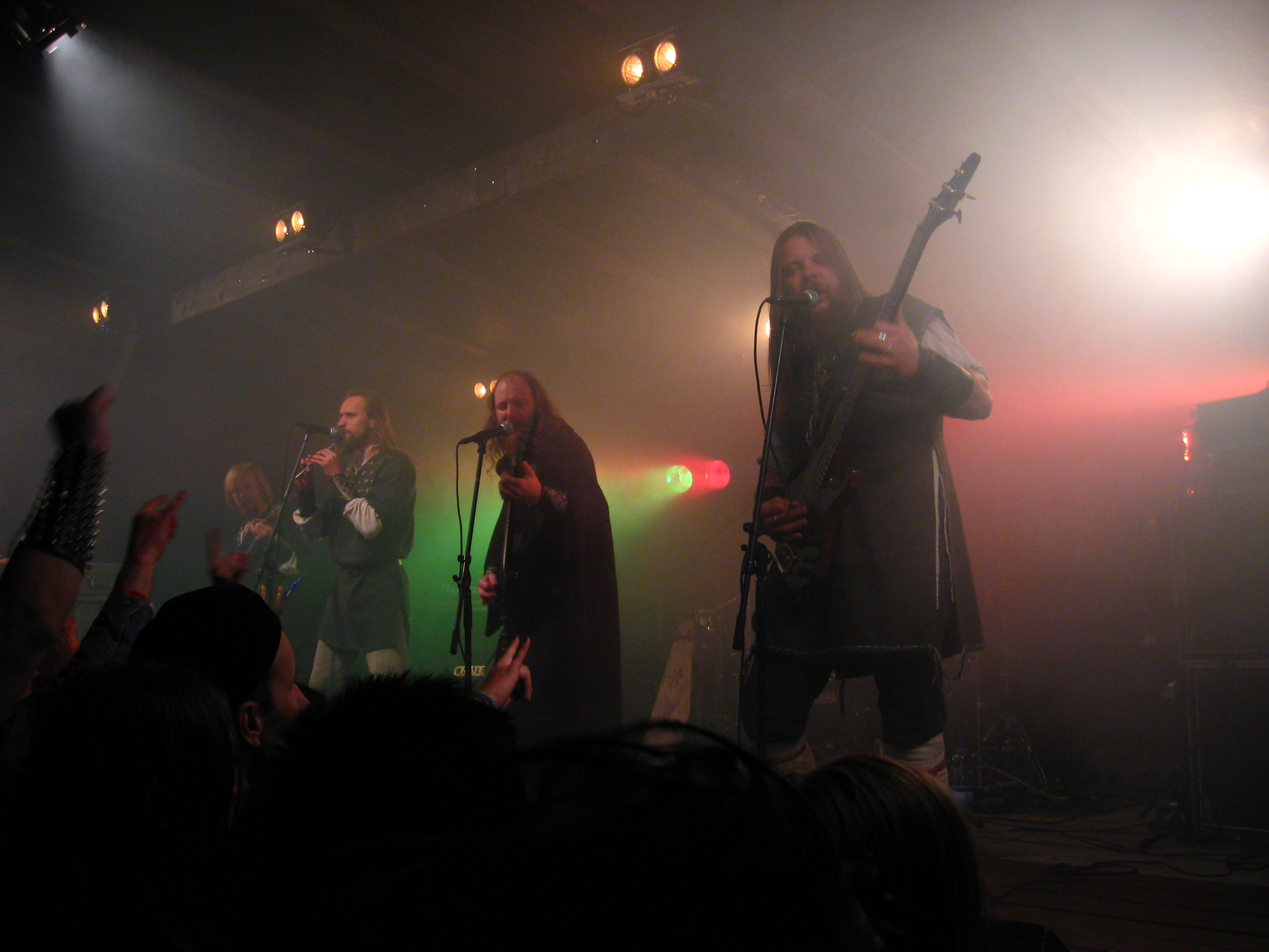 Skyforger playing at Zvērā Festival 2009 (Latvia).